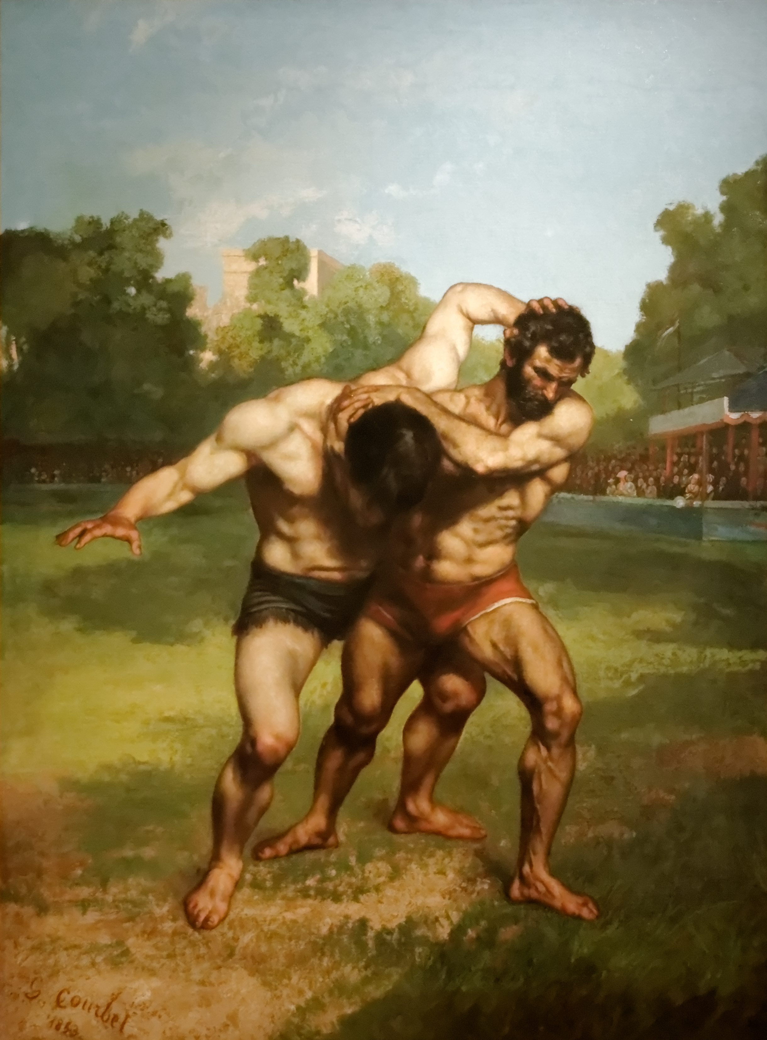 Wrestlerslabel QS:Len,"Wrestlers" label QS:Lfr,"Les lutteurs"